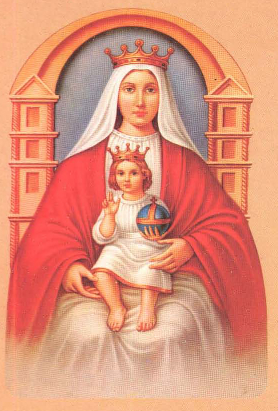 Noi, MeridaItalia, rilasciamo l'Immagine sotto licenza PD-ARTE, l'immagine raffigura una Stampa della Santissima Vergine di Coromoto, Patrona del Venezuela, l'Immagine è di pubblico Dominio. distinti saluti--MeridaItalia (msg) 13:40, 11 lug 2010 (CEST)